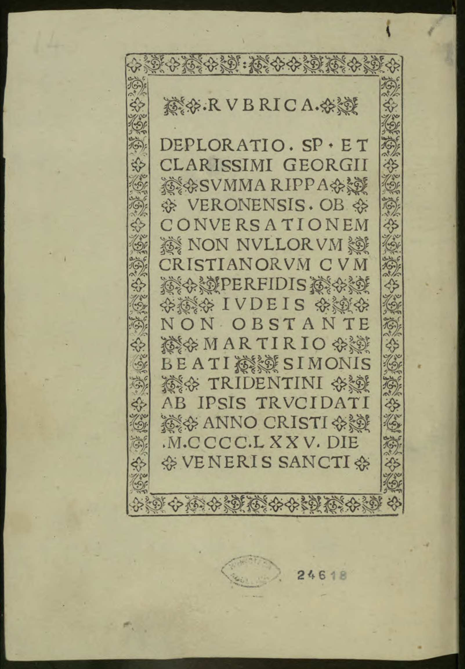 Martirio di Simone da Trento. - [Verona] : [Giovanni e Alberto Alvise], [circa 1478]. - 10 c. ; a¹⁰ ; 4º. - G. Petrella, Fra testo e immagine. Edizioni popolari del Rinascimento in una miscellanea ottocentesca. Udine 2009, n° 10 (Libri e Biblioteche, 23) .